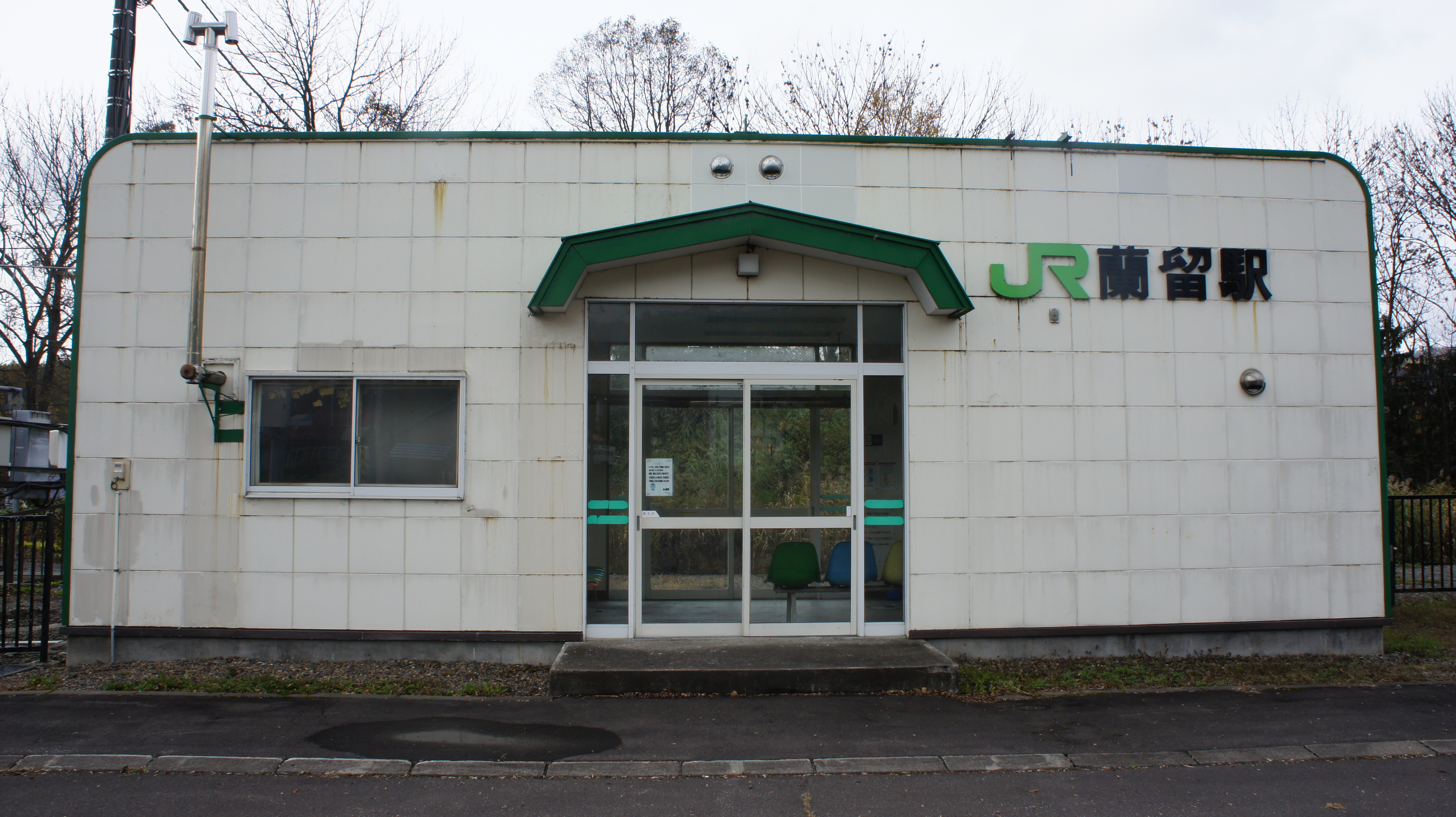 JR宗谷本線・蘭留駅の駅舎 Sony NEX-3